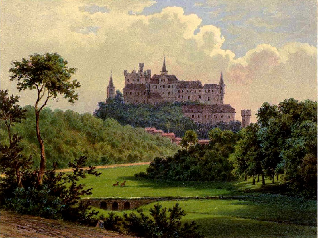 Schloss Braunfels Duncker. "Schloss Braunfels". Historische Ortsansicht. Farblithografie, 1867. 14,7 x 19,6 cm (Darstellung) / 29,5 x 37,7 cm (Blatt). Oberhalb betitelt "Rhein Provinz", "Regierungs-Bezirk Coblenz", "Kreis Wetzlar". Unterhalb mit den Verlagsangaben "Nach ein. Orig. Aufn. v. P. Vogel ausgef. v. Winckelmann & Söhne", "Verlag v. Alexander Duncker, Königl. Hofbuchhändler in Berlin". Unterhalb der Darstellung "Schloss Braunfels". Lithografie original vom Verlag auf Untersatzkarton montiert. - Schöne romantische Ansicht vom Schloss aus der Ferne. Das Schloss Braunfels liegt auf einer Basaltkuppe im mittelhessischen Lahn-Dill-Kreis. Seit dem 13. Jahrhundert ist es Sitz der Grafen, seit 1742 Fürsten zu Solms-Braunfels und befindet sich noch im 21. Jahrhundert im Familienbesitz der Grafen von Oppersdorff-Solms-Braunfels, die in weiblicher Linie vom letzten Fürsten zu Solms-Braunfels abstammen. Landkreis Lahn-Dill-Kreis, Ortsansichten Hessen, Schlösser in Hessen